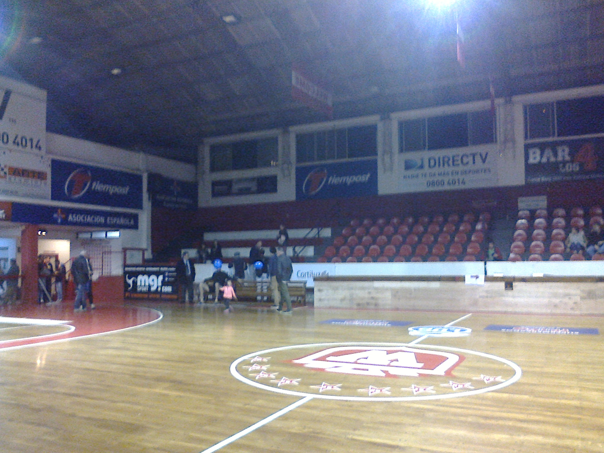 Estadio Óscar Magurno, del Club Atlético Welcome